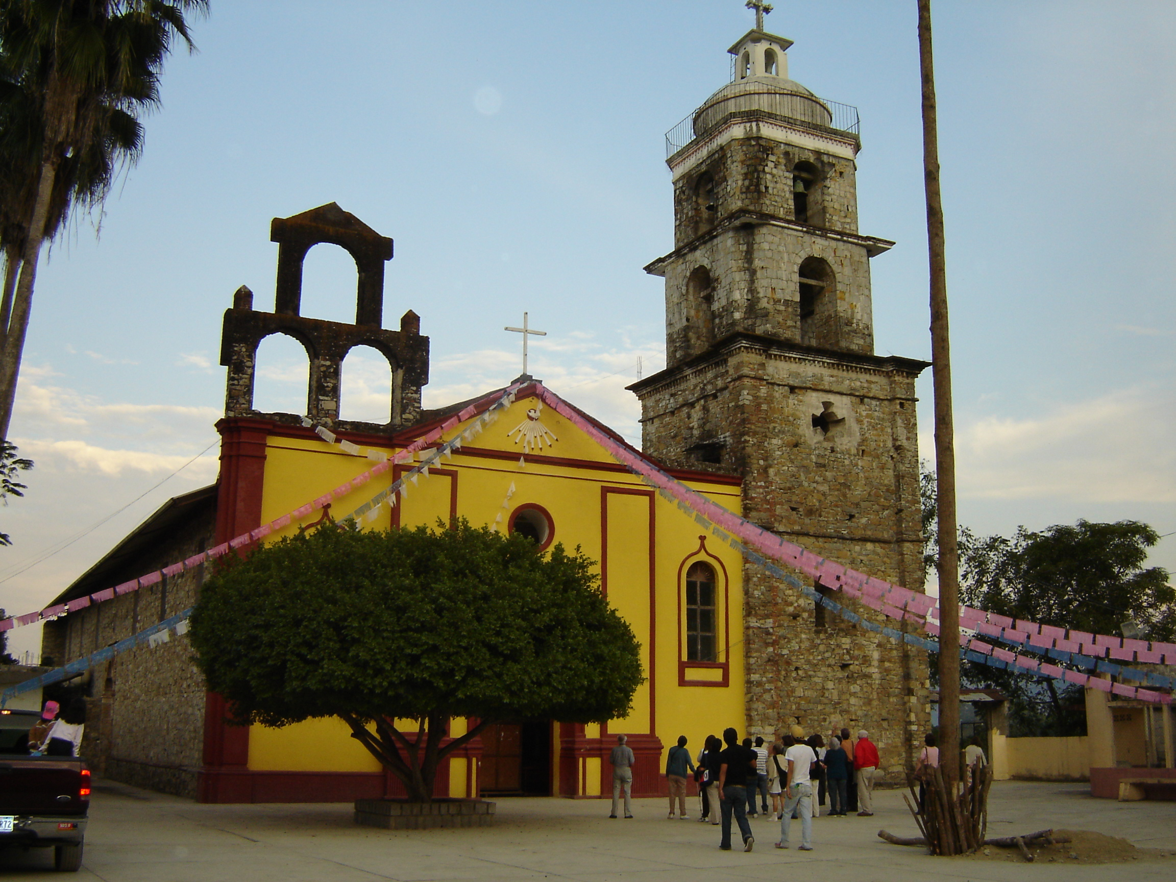 Templo de San Miguel Arcángel en Aquismón, San Luis Potosí